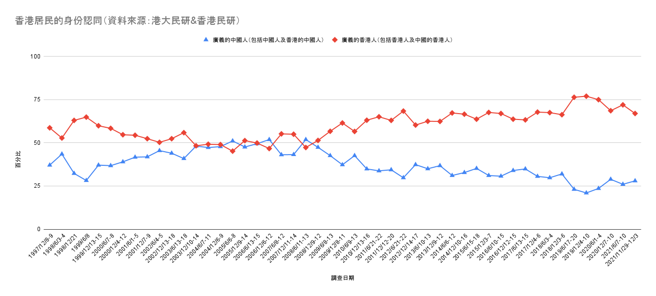 回歸以來香港居民的身份認同